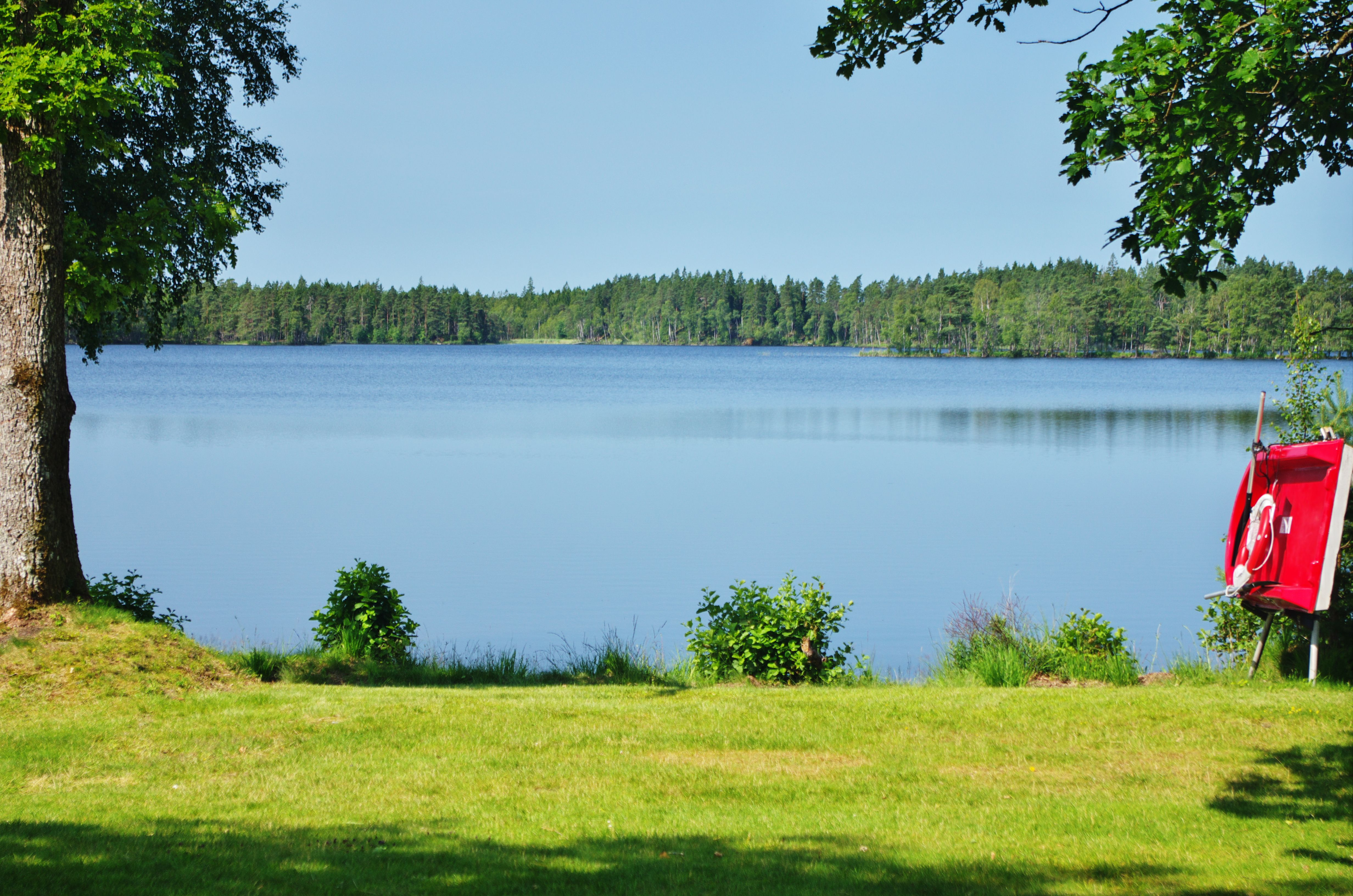 Skärshultasjön i Sävsjö kommun i Småland i Sverige. Fotot är taget från badplatsen åt väster.